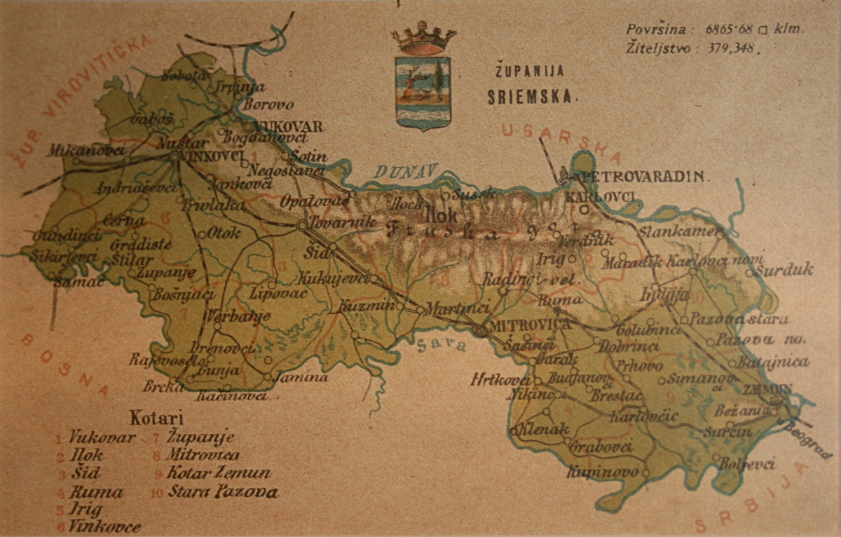 Zemljovidi županija na razglednicama oko 1900. godine, snimljeno tijekom Noći muzeja